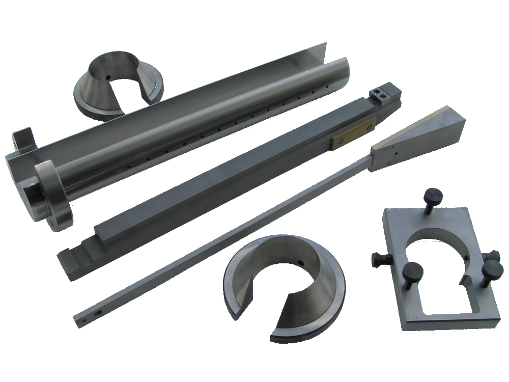 Beispiel für einen kpl. Werkzeugsatz, bestehend aus: Zentrierkonen, Werkzeugführung, Messerhalter, Vorschubstange, Spannstück